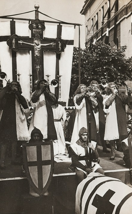 Sfilata storica per il Palio di Legnano 2015